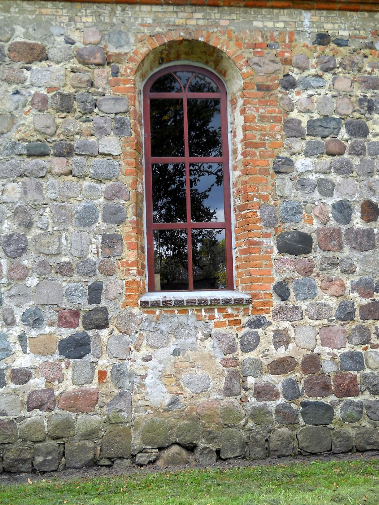 Kościół w Wojcieszycach. Ślad po zamurowanym portalu w ścianie północnej.